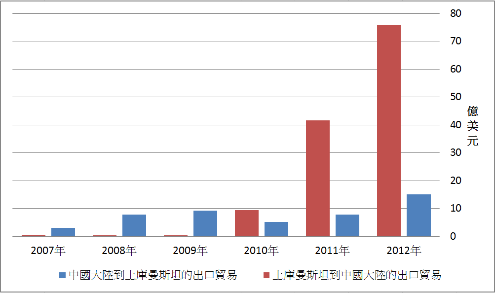 中文（香港）: 中國大陸與土庫曼斯坦的貿易